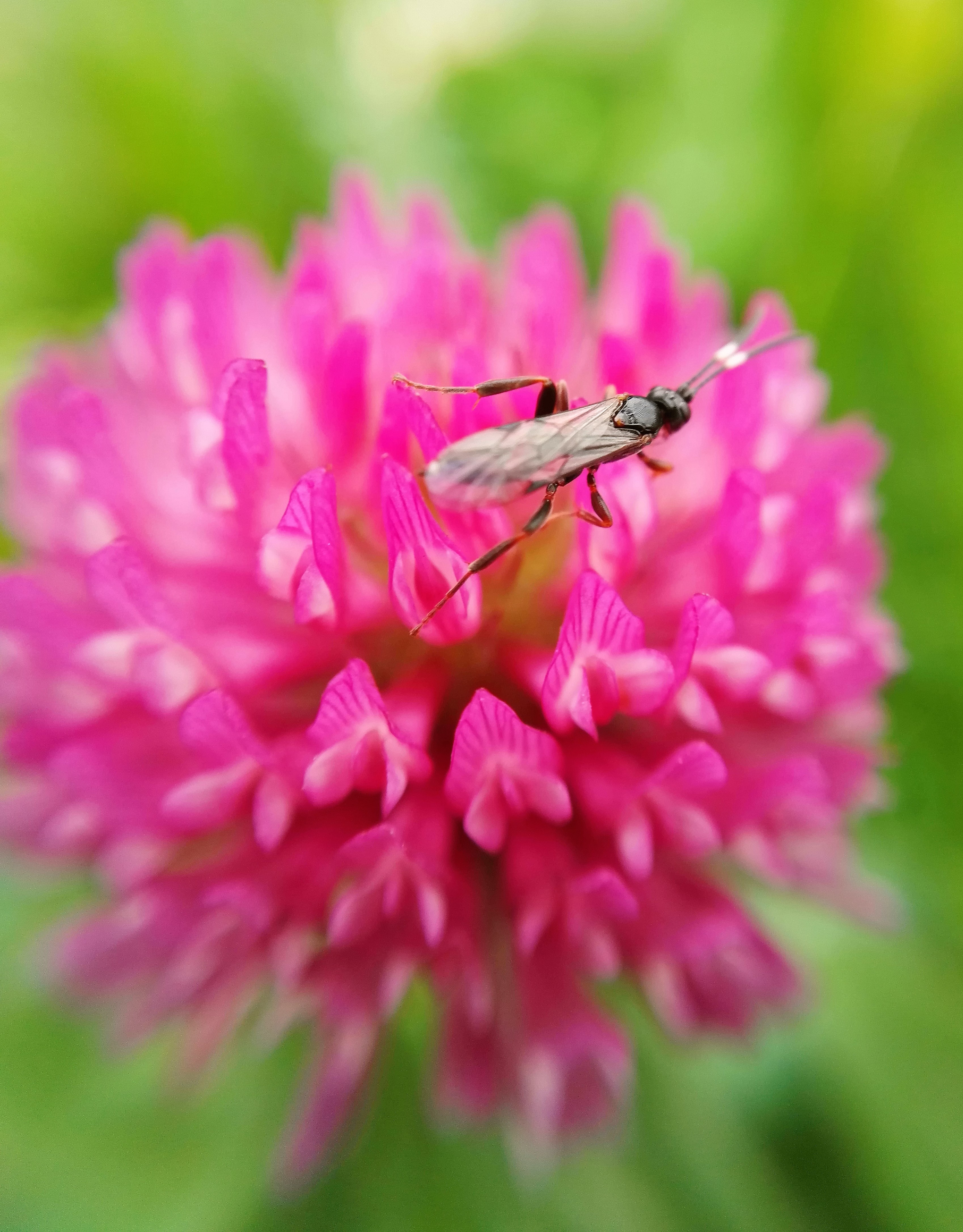 Raudkløver